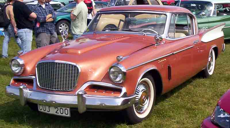 Studebaker Golden Hawk 1957